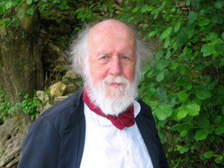 Hubert Reeves, le jour du mariage de son fils Benoît